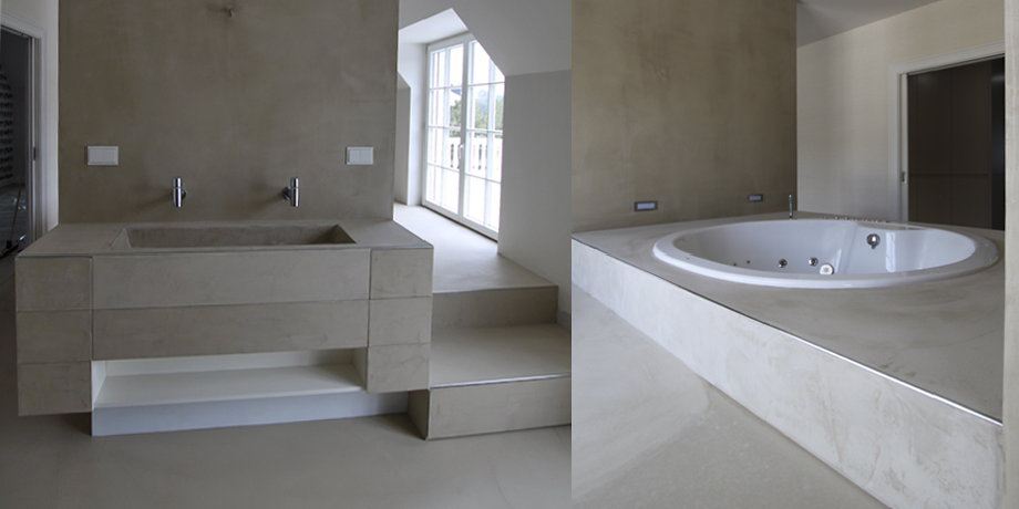 Möbel und Dusche aus Sichtestrich